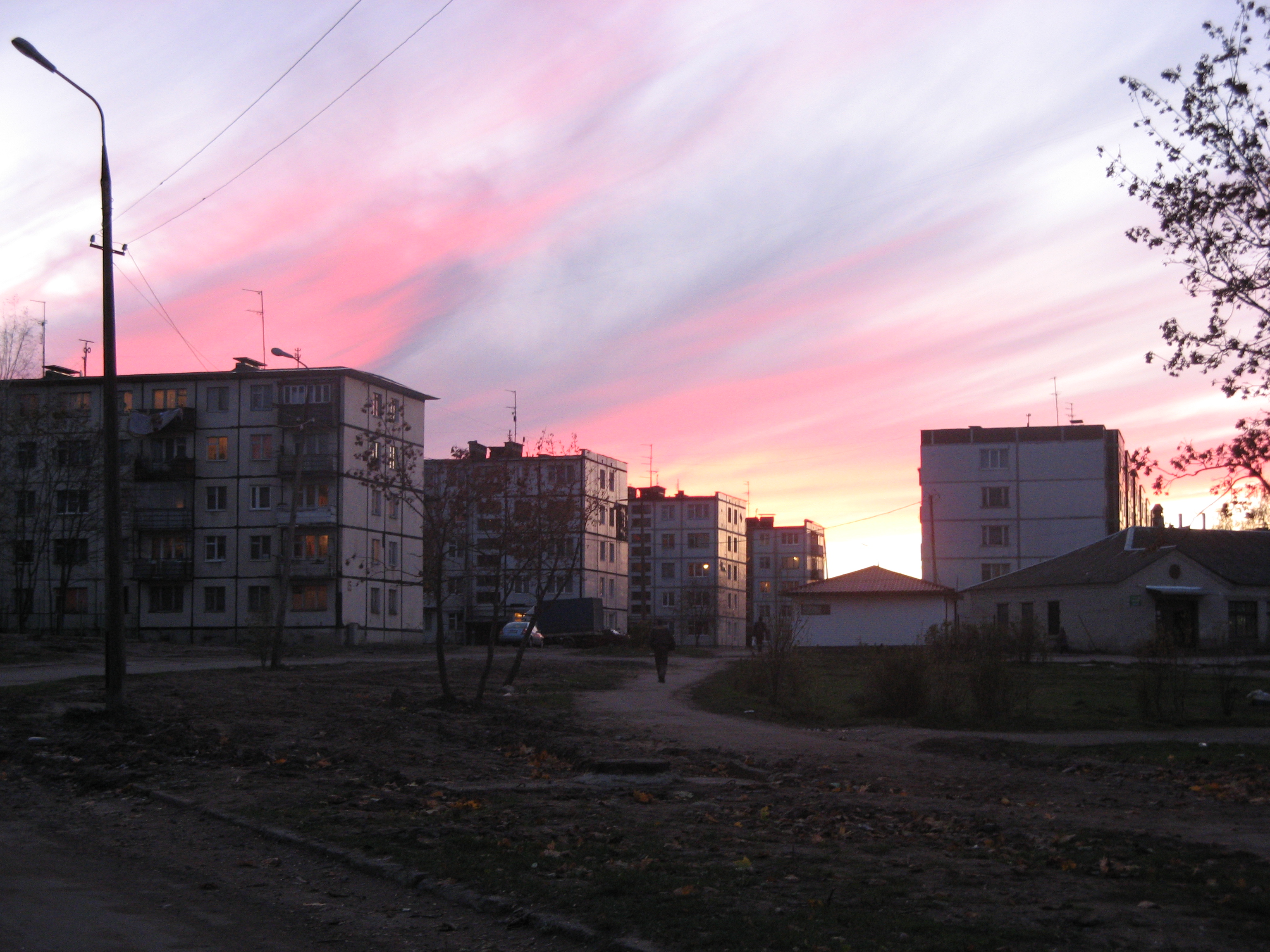 Посёлок Селезнёво (Ленинградская область)